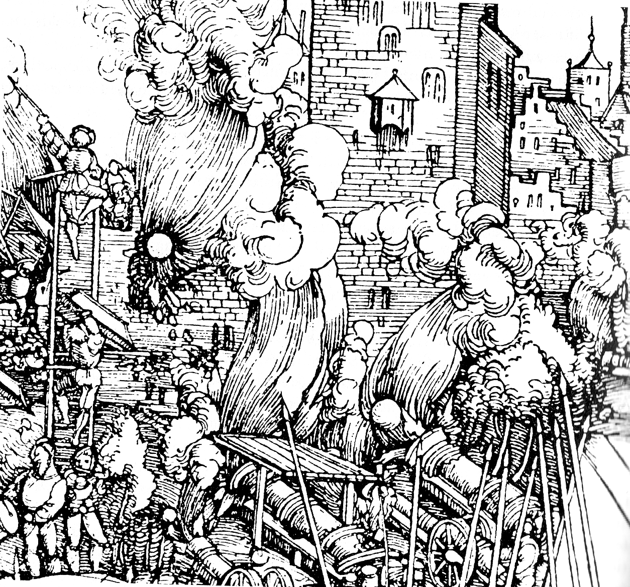 Erstürmung einer Stadt, Stich aus dem späten 15. Jhdt. Sonstiges: Wiedergabe eines Drucks des 15. Jhdts., vermutlich PD (Schutzrecht)